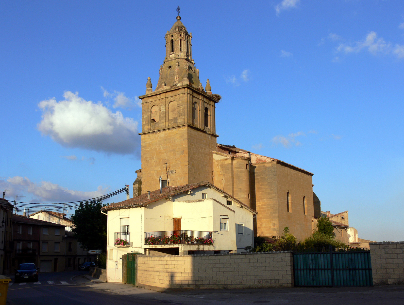 Iglesia de la Natividad en Castañares de Rioja (La Rioja - España).